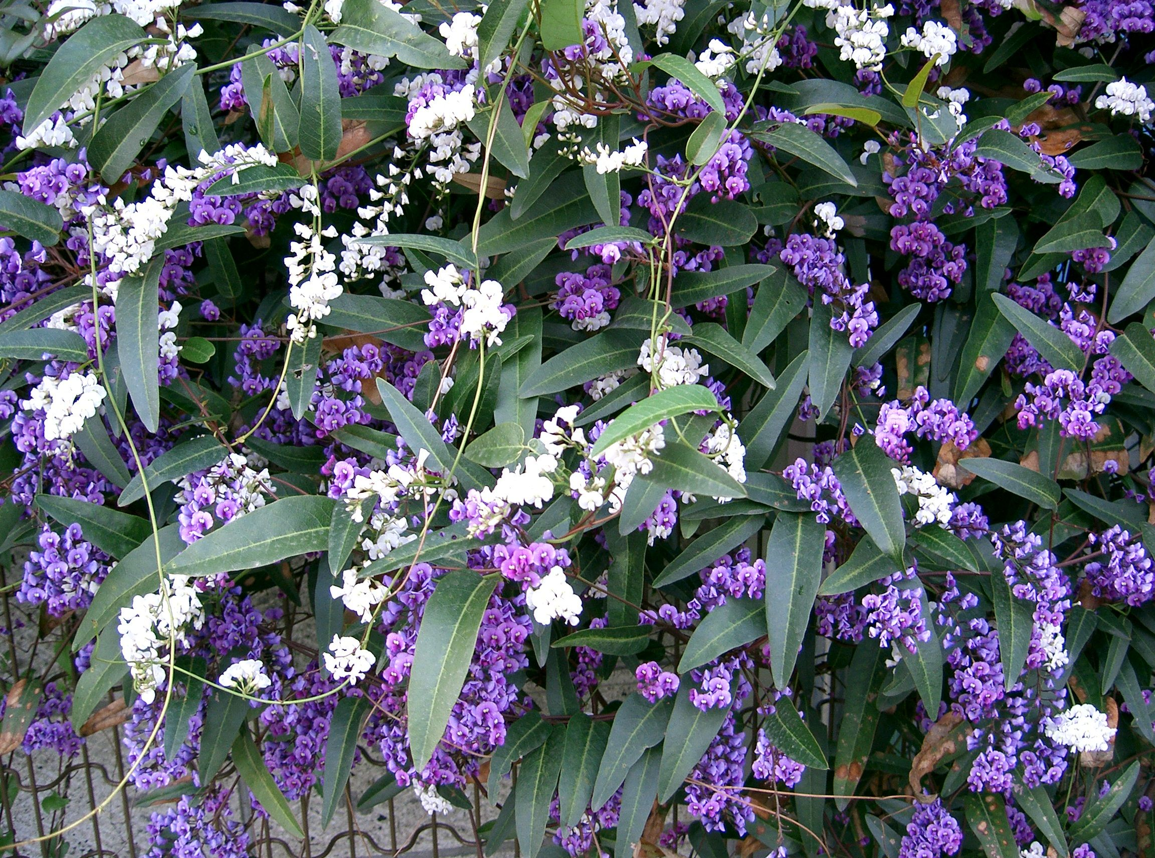 Hardenbergia violacea